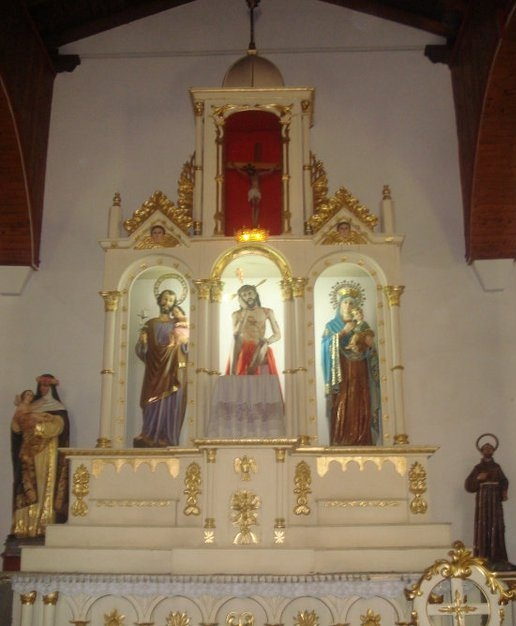 Imagen del Altar del Señor de la Humildad. Capilla de la Humildad, Santa Rosa de Osos